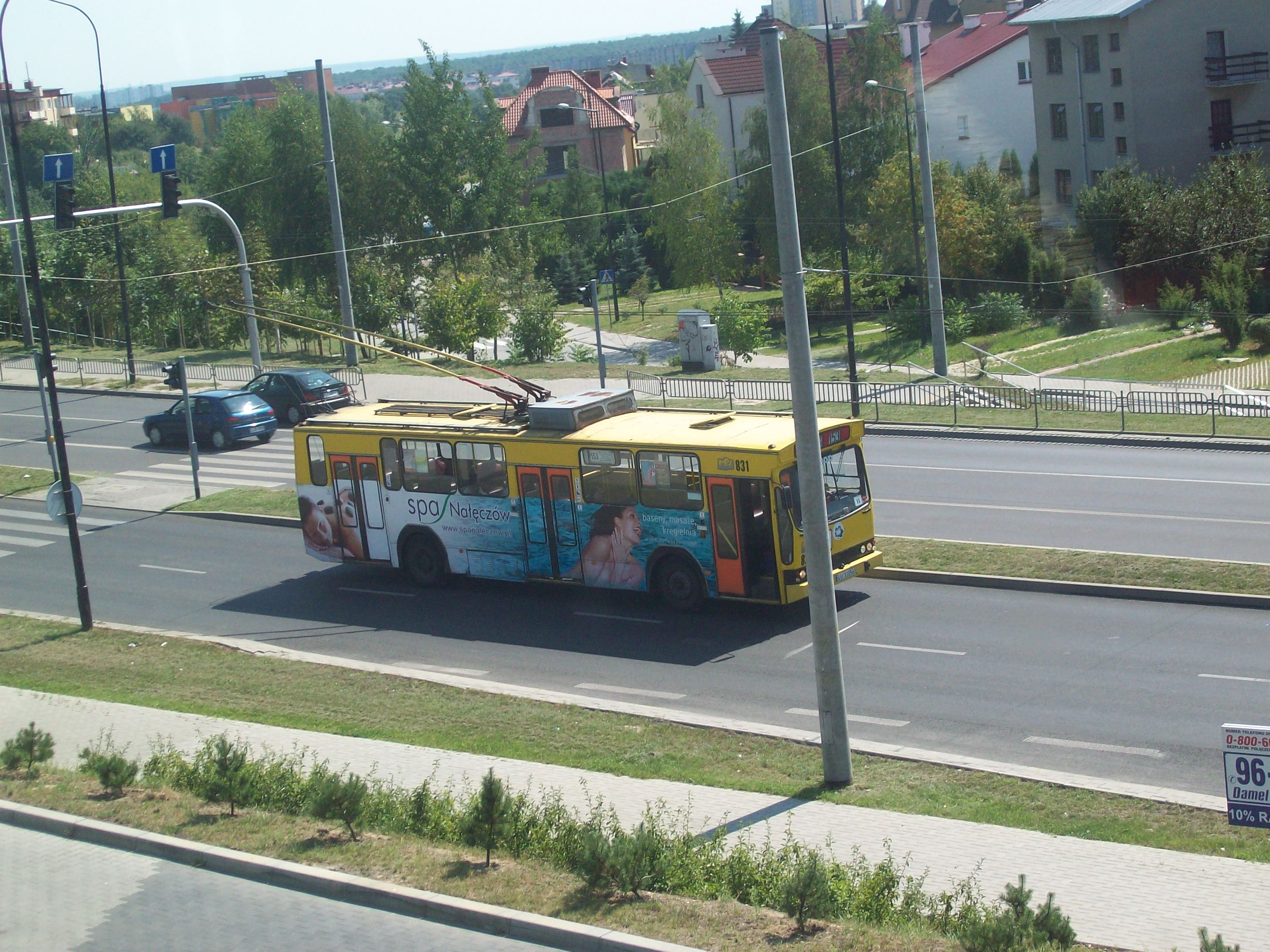 Trolejbus Jelcz PR110E na linii 153 na ul. W. Orkana w Lublinie. Zdjęcie wykonane z Galerii "Orkana". Wykonay przez firmę KPNA ze Słupska w 1991 roku.